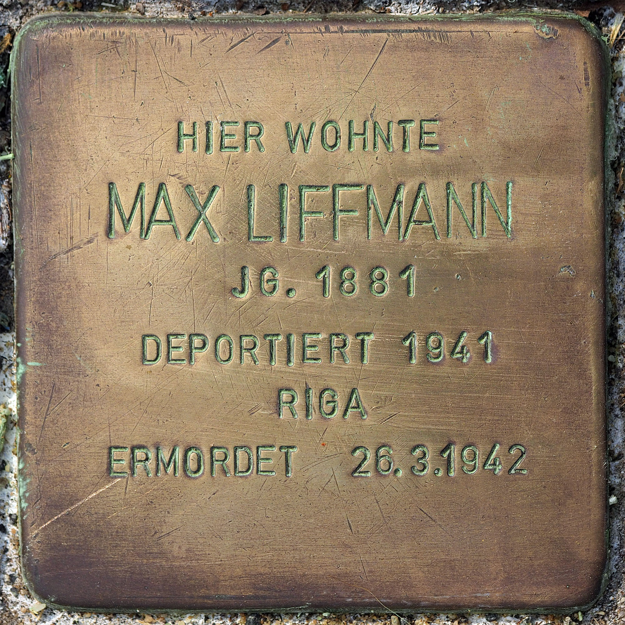 Stolpersteine MG: Liffmann, Max